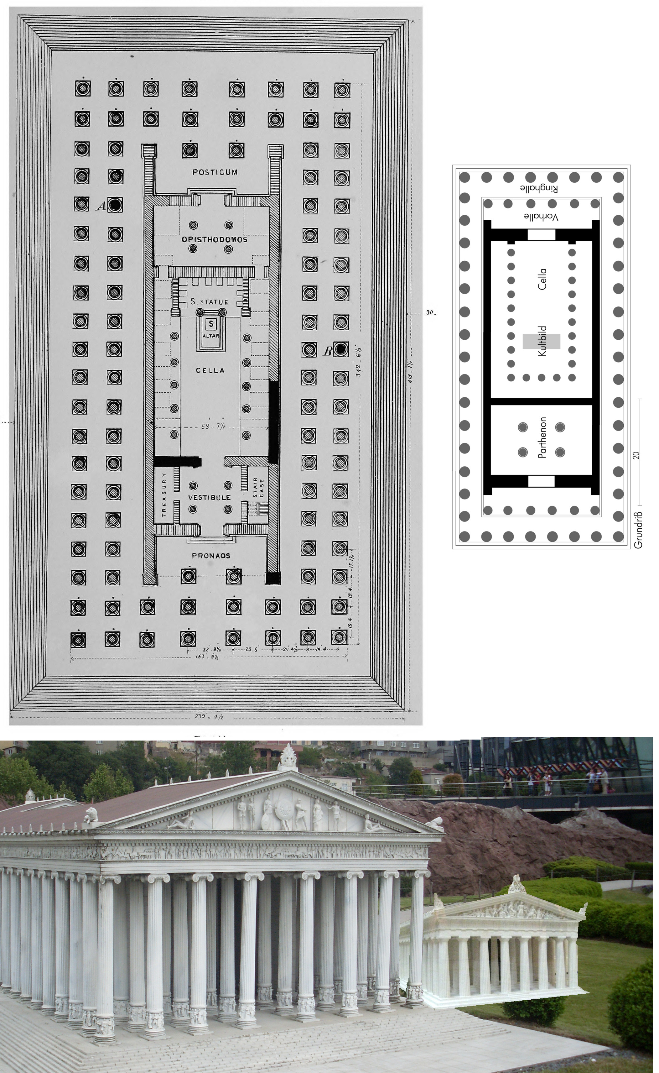 Comparación del Partenón con el templo de Artemisa en Efeso.